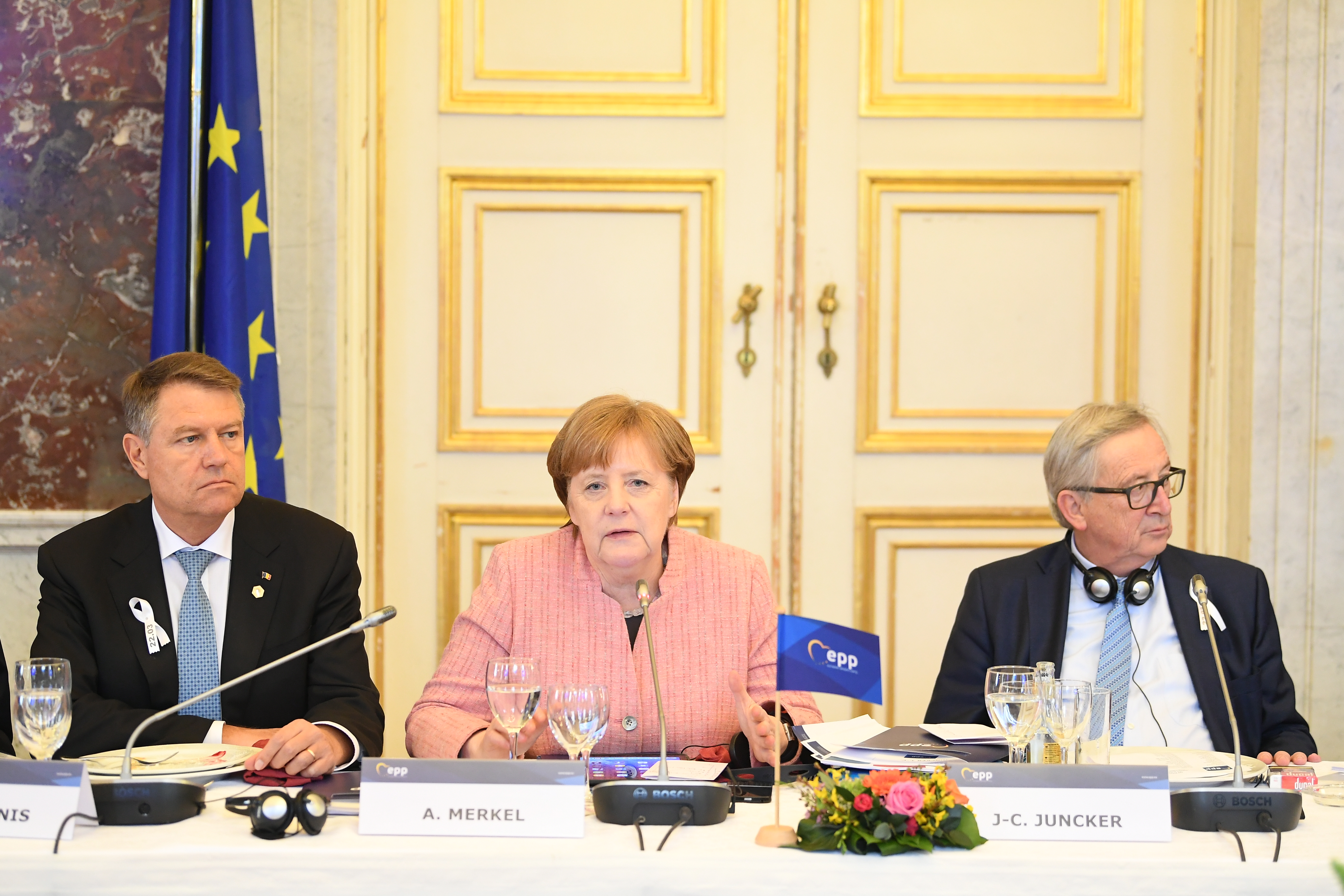 EPP Summit, 22 March 2018